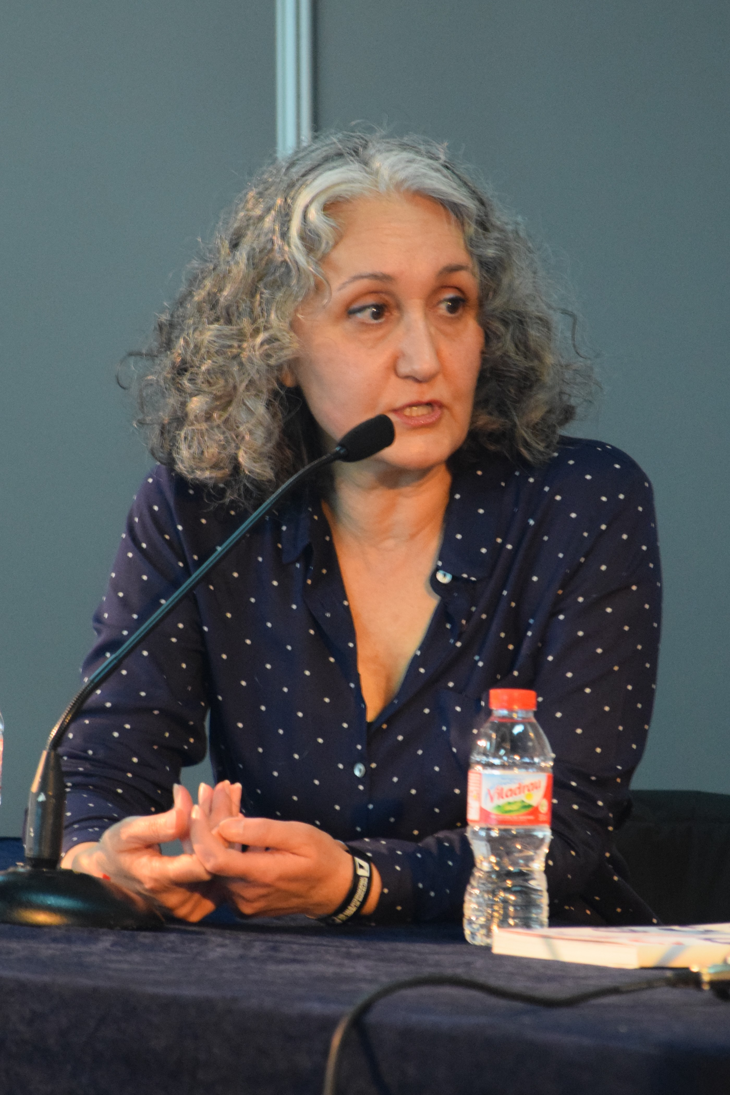 La il·lustradora Ana Miralles parlant a la taula rodona "Dones, la baula perduda del còmic". Saló Internacional del Còmic de Barcelona de 2017. Dijous 30 de març de 2017.